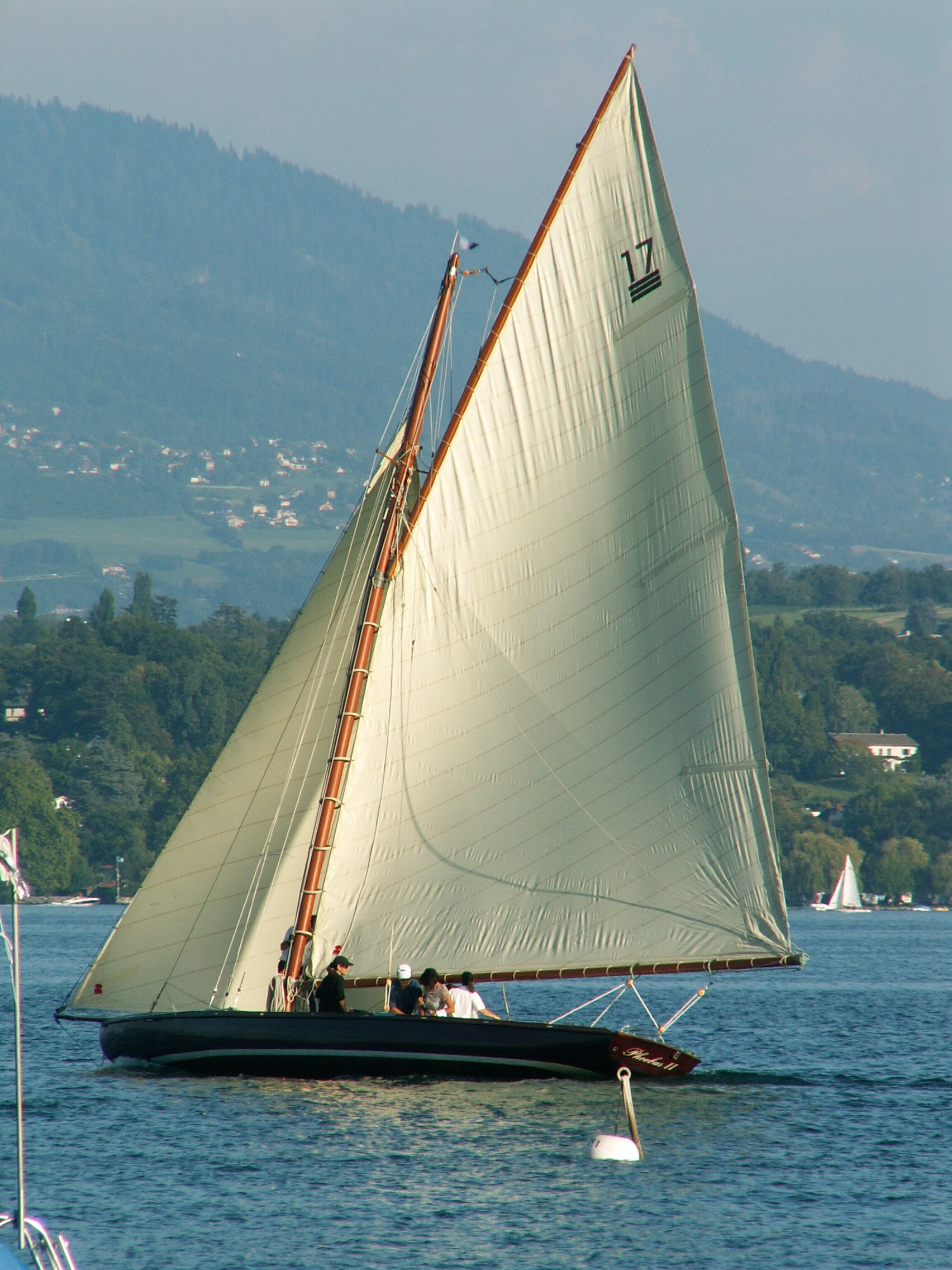 Le "3 tonneaux" Phoebus vient de quitter son mouillage